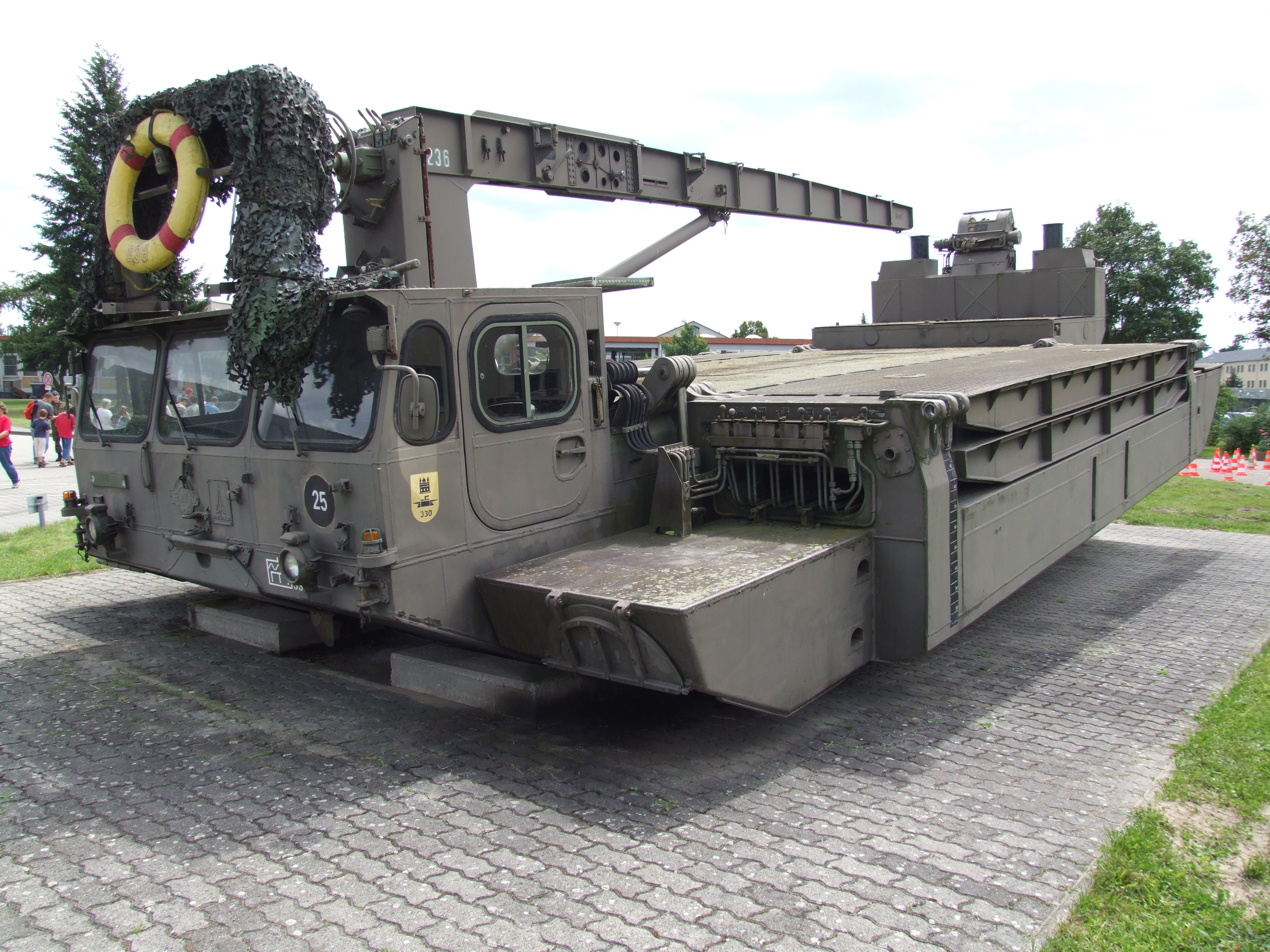 Pionierbrückenfahrzeug Schwimmschnellbrücke M2B Alligator von den EWK Eisenwerke Kaiserslautern, Deutz, Kurpfalz-Kaserne Speyer-Nord, Tag der offenen Tür, 7.7.2007